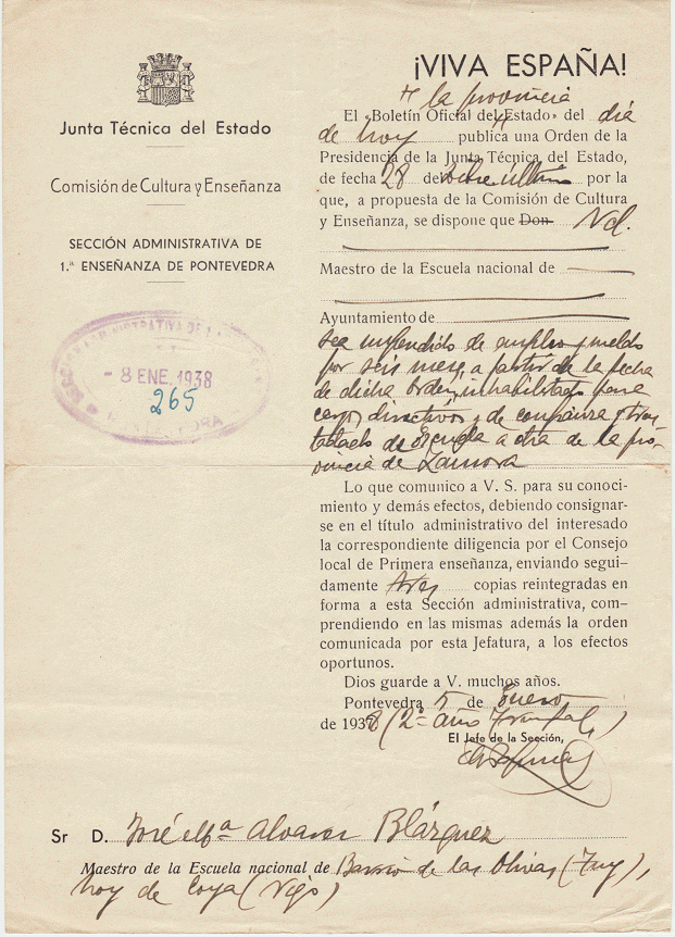 Comisión de Cultura y Enseñanza. Comunicación: "...sea suspendido de empleo y sueldo por seis meses, a partir de la fecha de dicha Orden, inhabilitado para cargos directivos y de confianza y trasladado de escuela a otra de la provincia de Zamora", a José M Álvarez Blázquez. Para contextualizar el presente documento véase: Depuración franquista del magisterio español